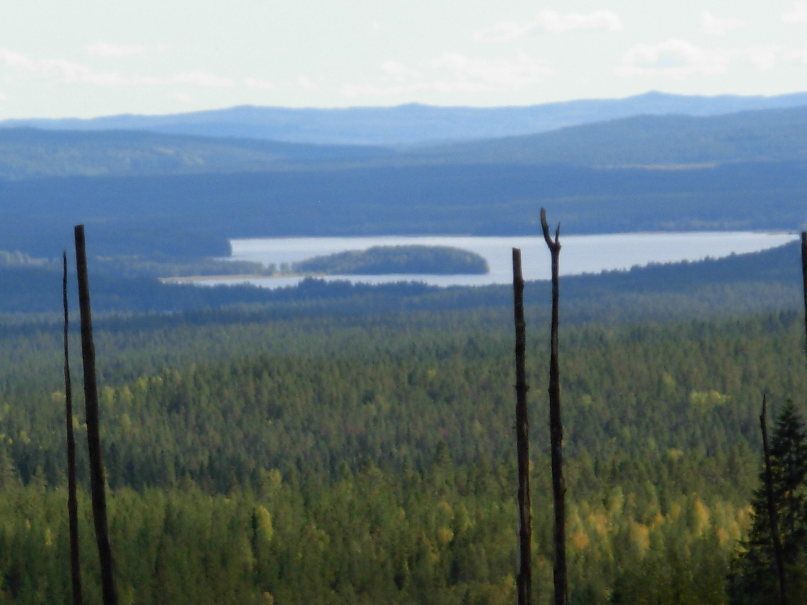 Oresjön är en större sjö som ligger i Rättviks kommun.